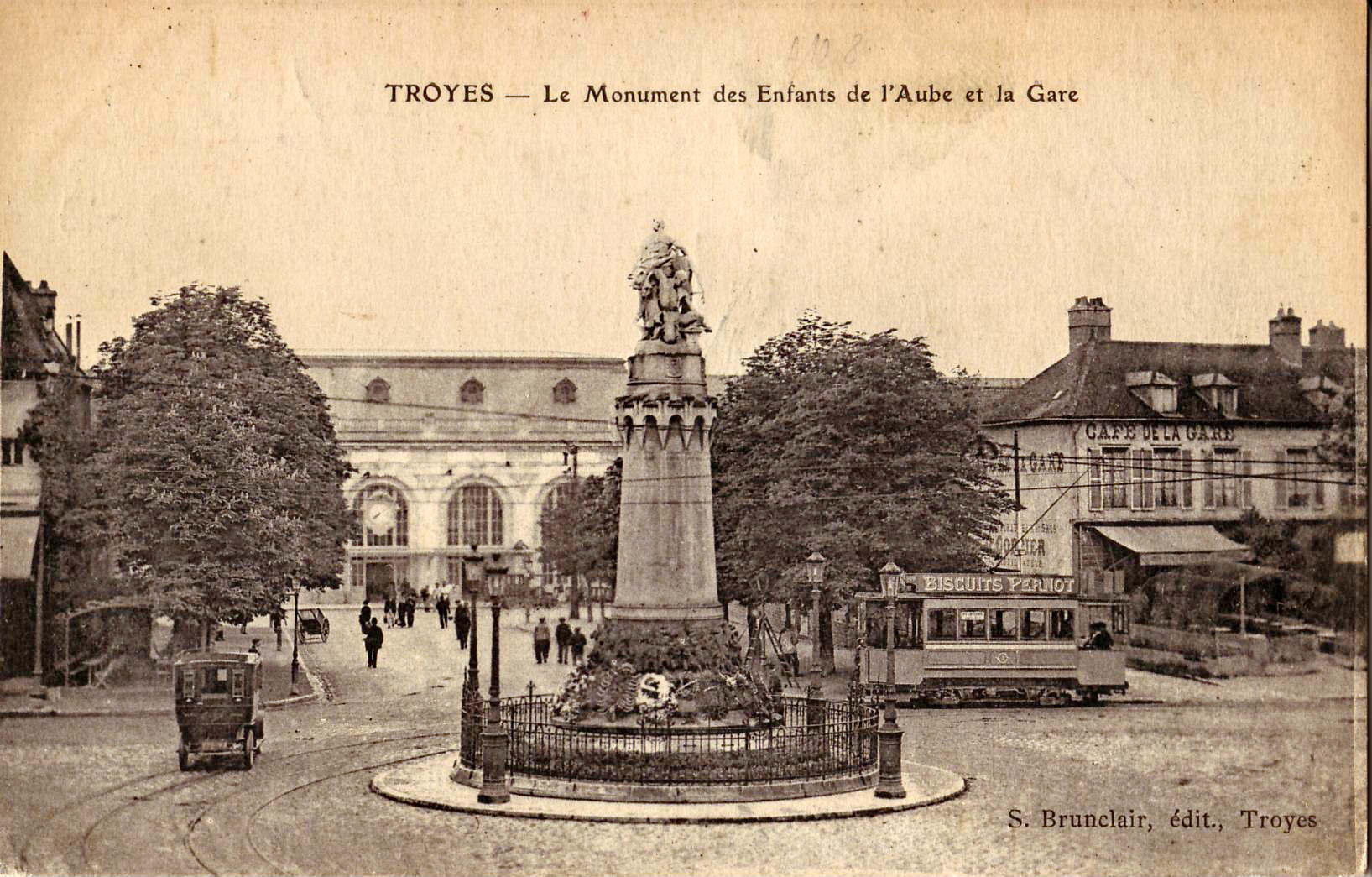 Carte postale ancienne éditée par S. Brunclair, éditeur à Troyes :TROYES : Le Monument des Enfants de l'Aube et la Gare.Vue d'une motrice électrique du tramway de Troyes